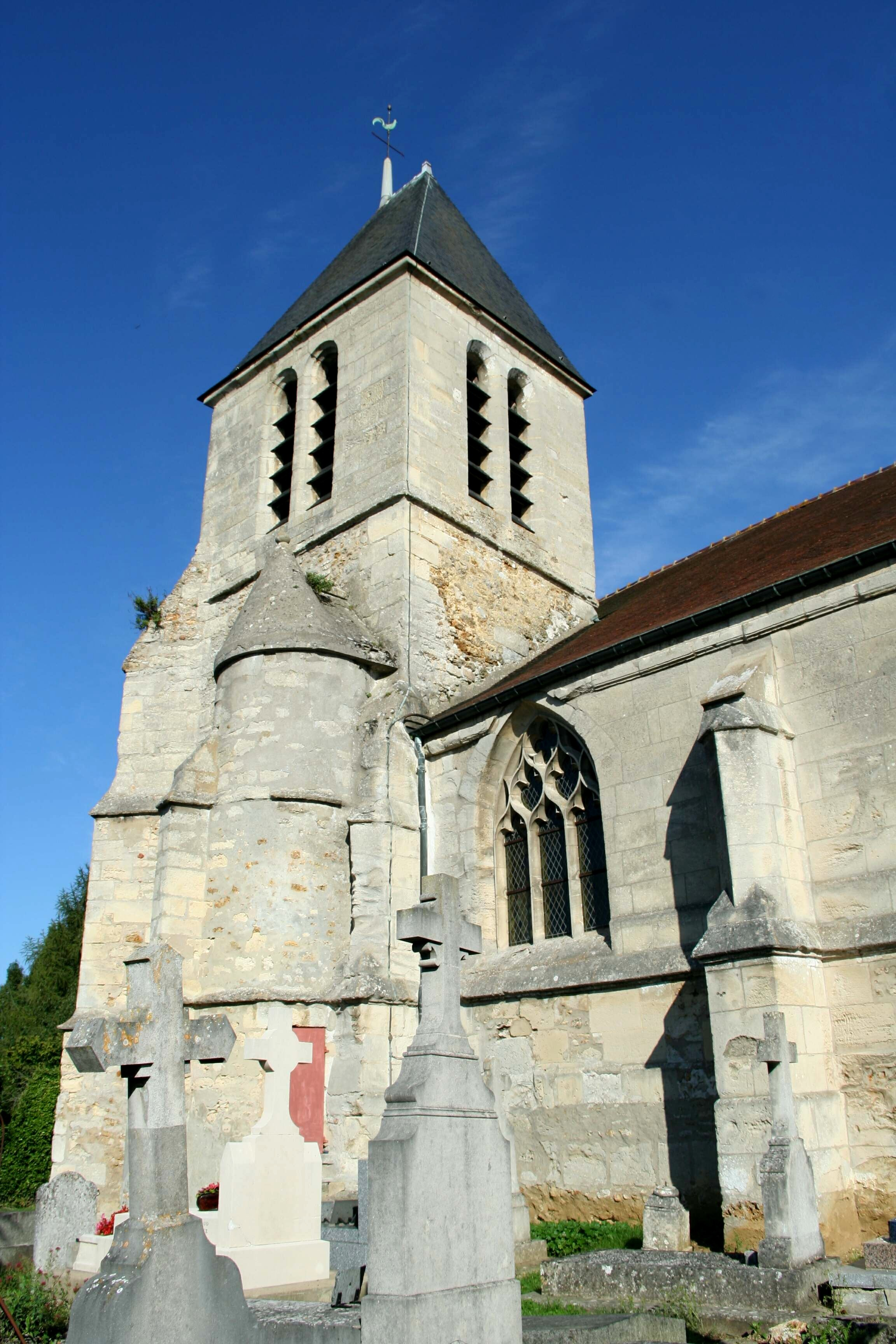 Église de Lainville-en-Vexin - Yvelines (France)